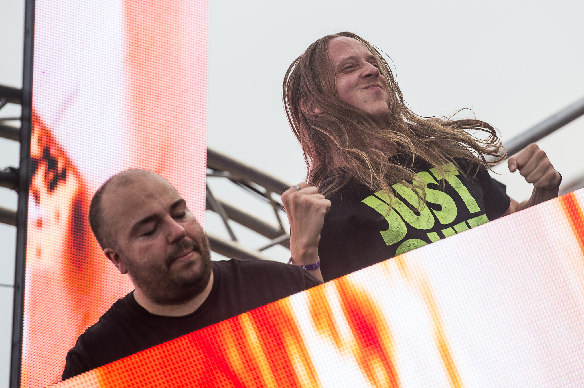 3rd Stage,Festival,Konzert,Livekonzert,Livemusik,Musik,Open Beatz 2016,Pegboard Nerds